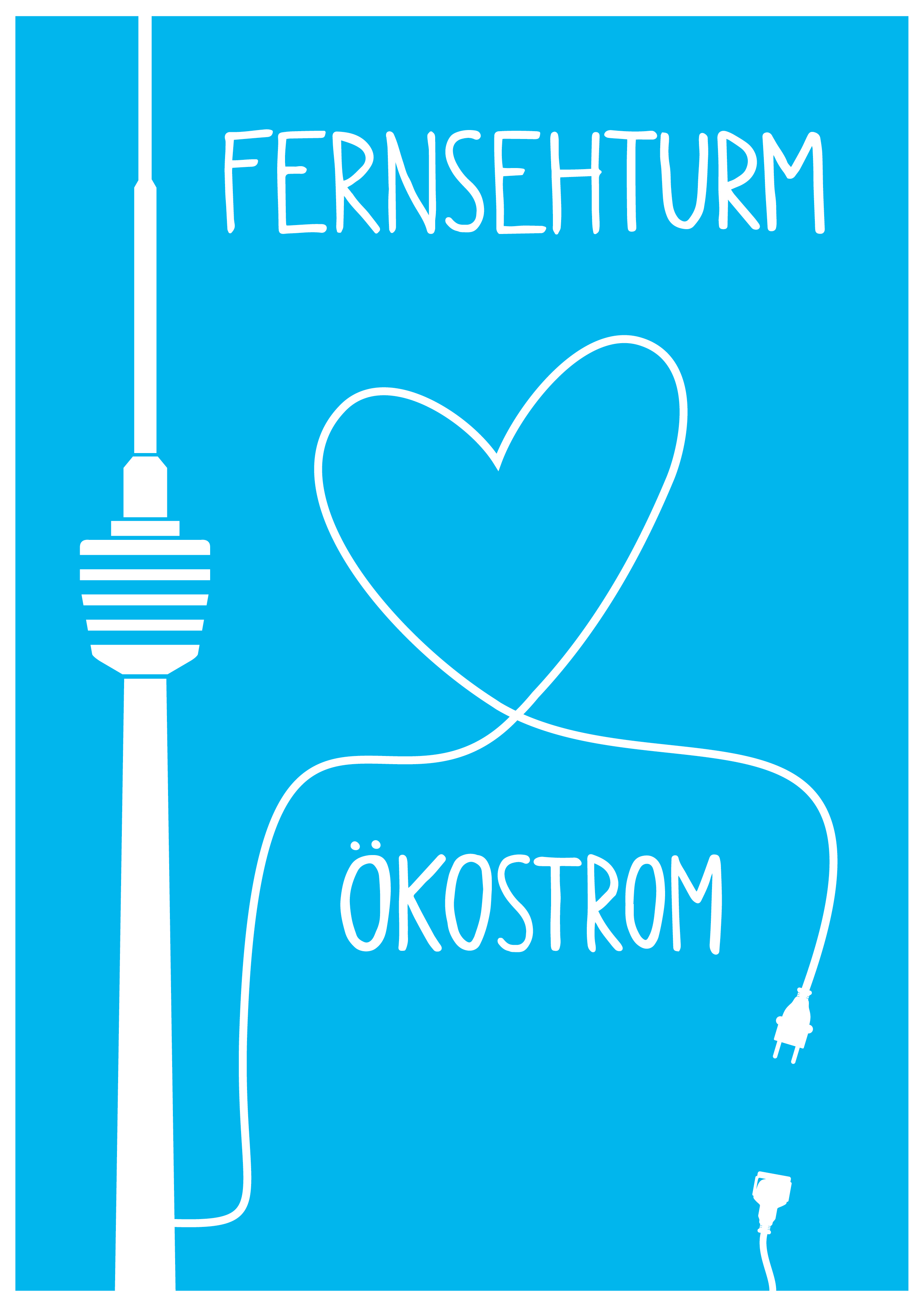 Kampagnenmotiv Fernsehturm liebt Ökostrom der SWS